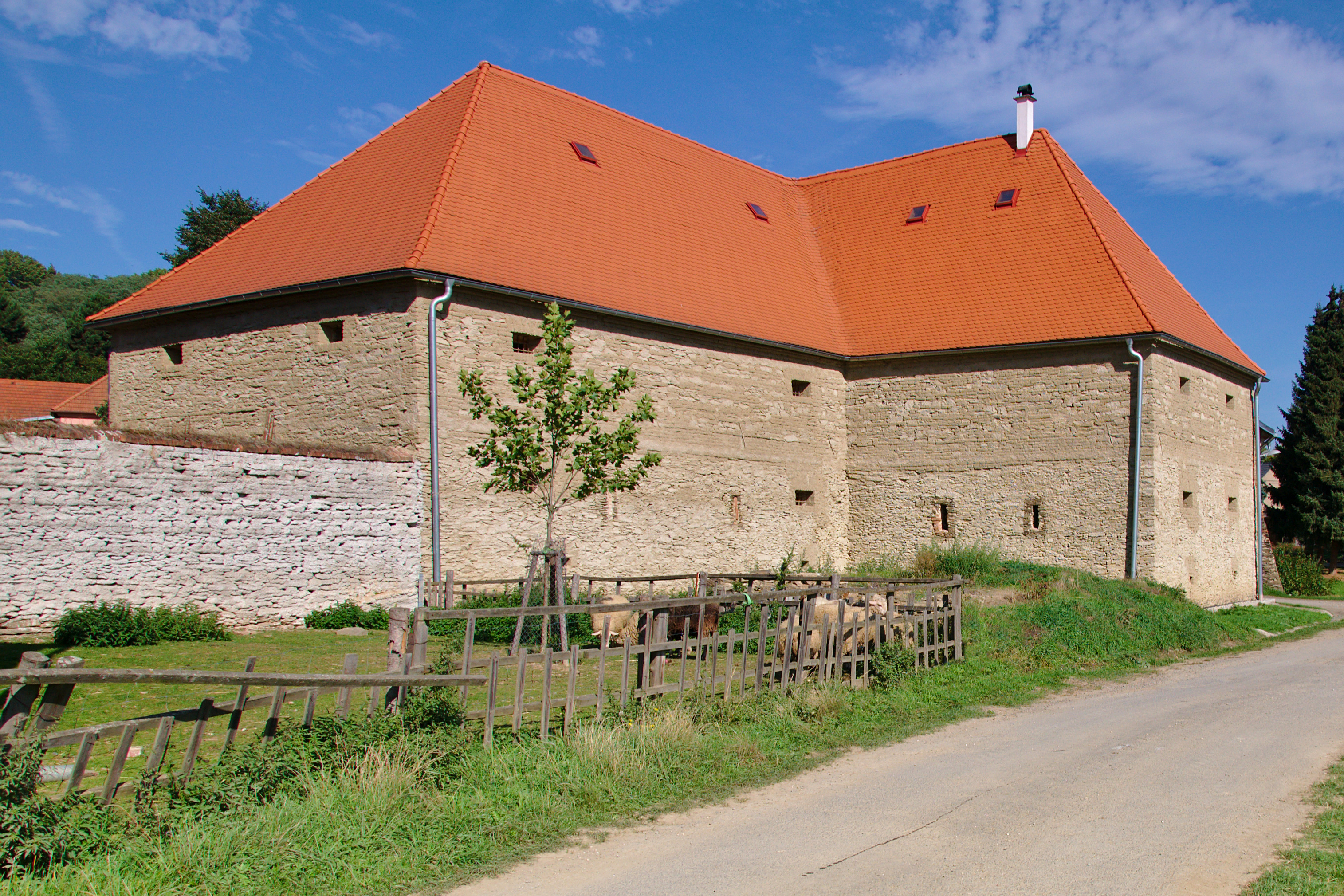 Barokní sýpka, Ludéřov, Drahanovice, okres Olomouc